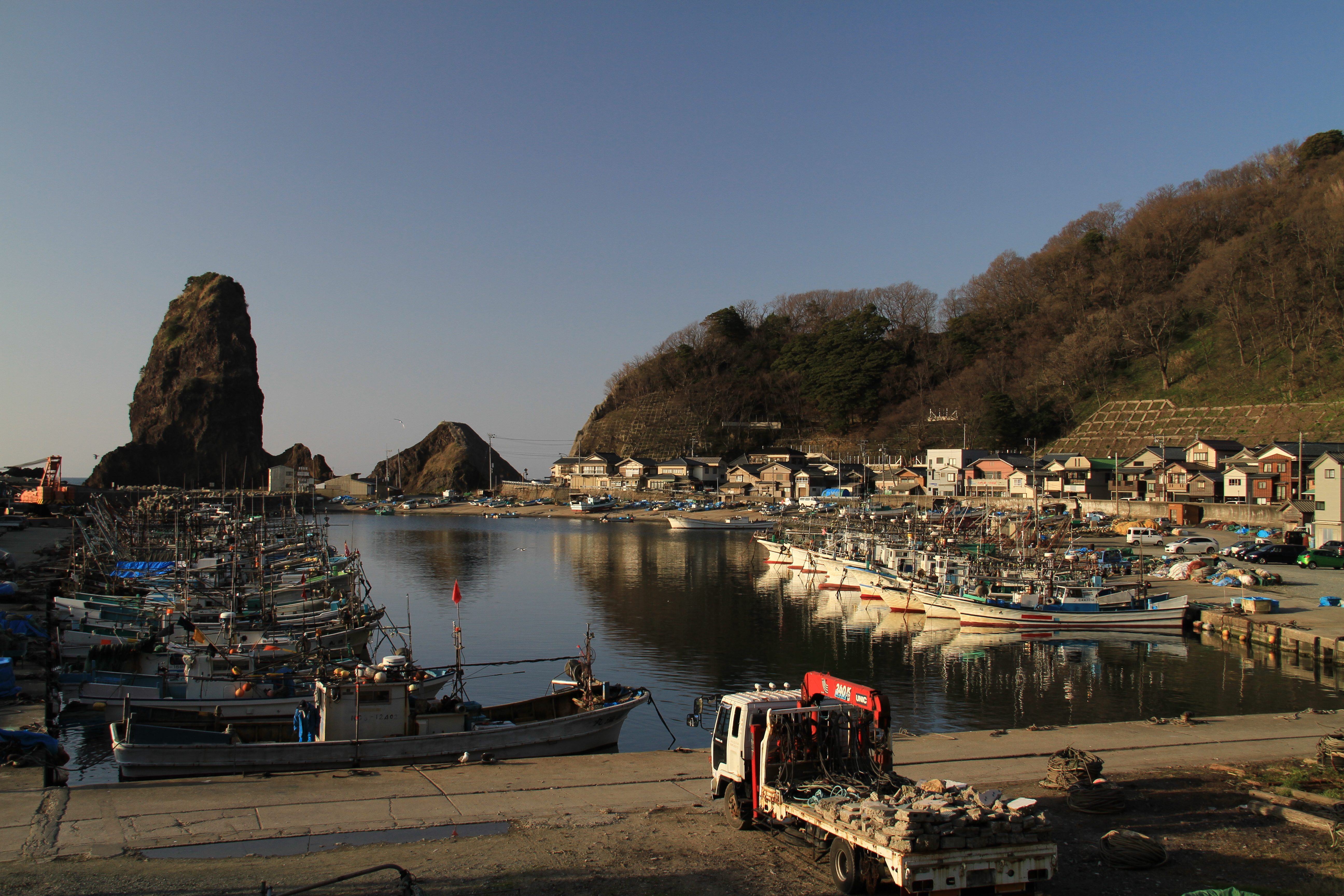 Neya, Murakami, Niigata Prefecture 959-3946, Japan